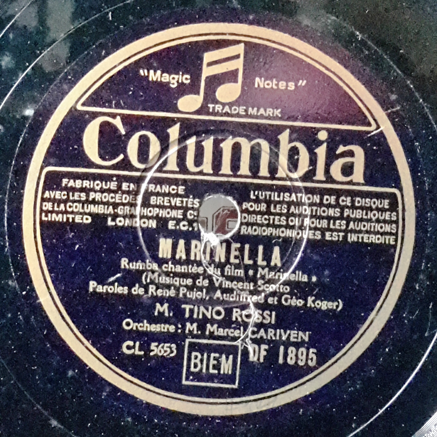 Label der frz. Columbia, Titel ist eine berühmte französische Aufnahme von Tino Rossi